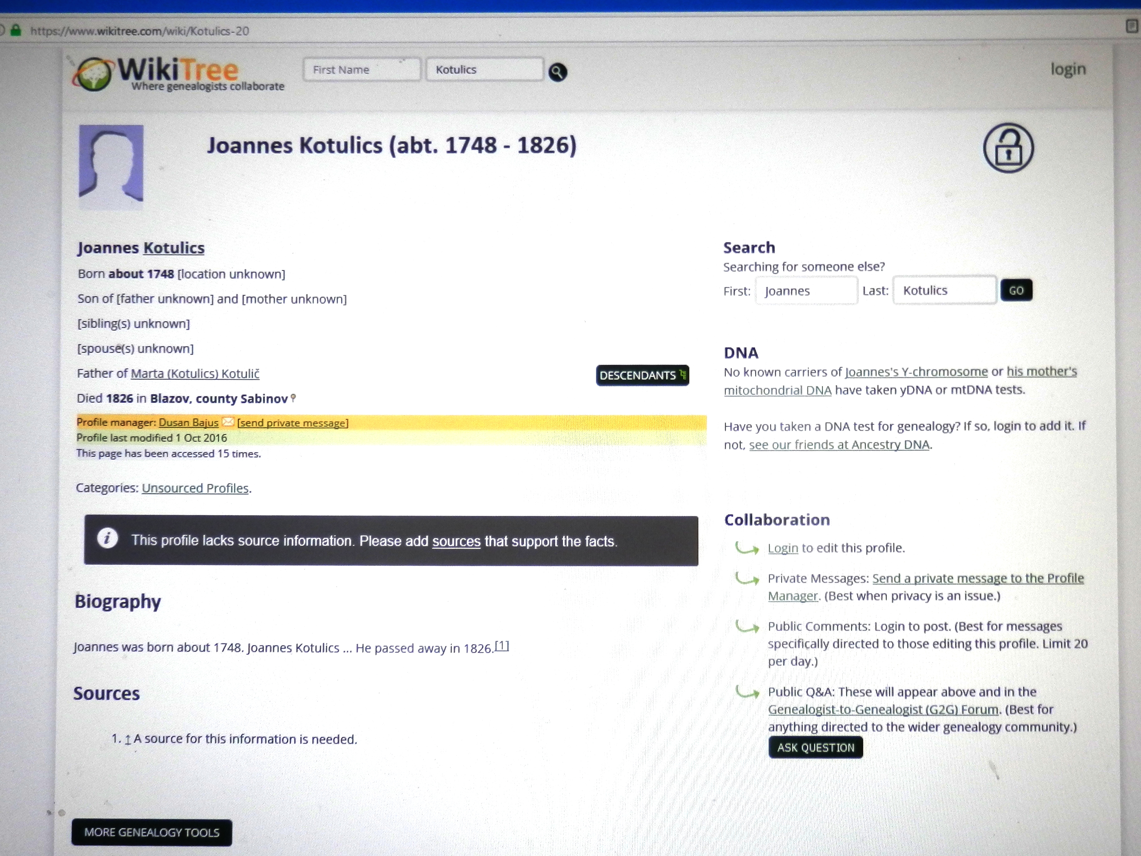 Digitalizácia záznamu o priezvisku Kotulič. Joannes Kotulics, (1748 až 1826) Bývalá obec Blažov, okres Sabinov, Slovensko.